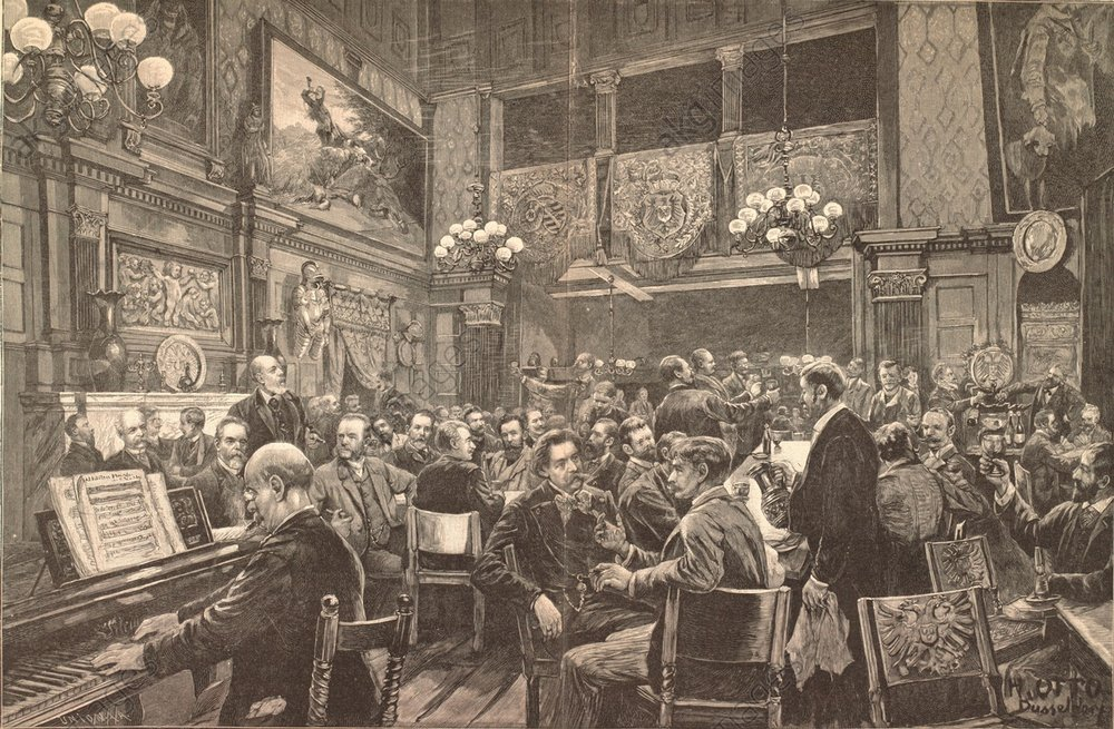 Festbowle im Malkasten Düsseldorf. Holzstich, um 1890, nach Zeichnung von Henrich Otto (1858–1923). Dargestellt ist unter anderem Jacobus Leisten.